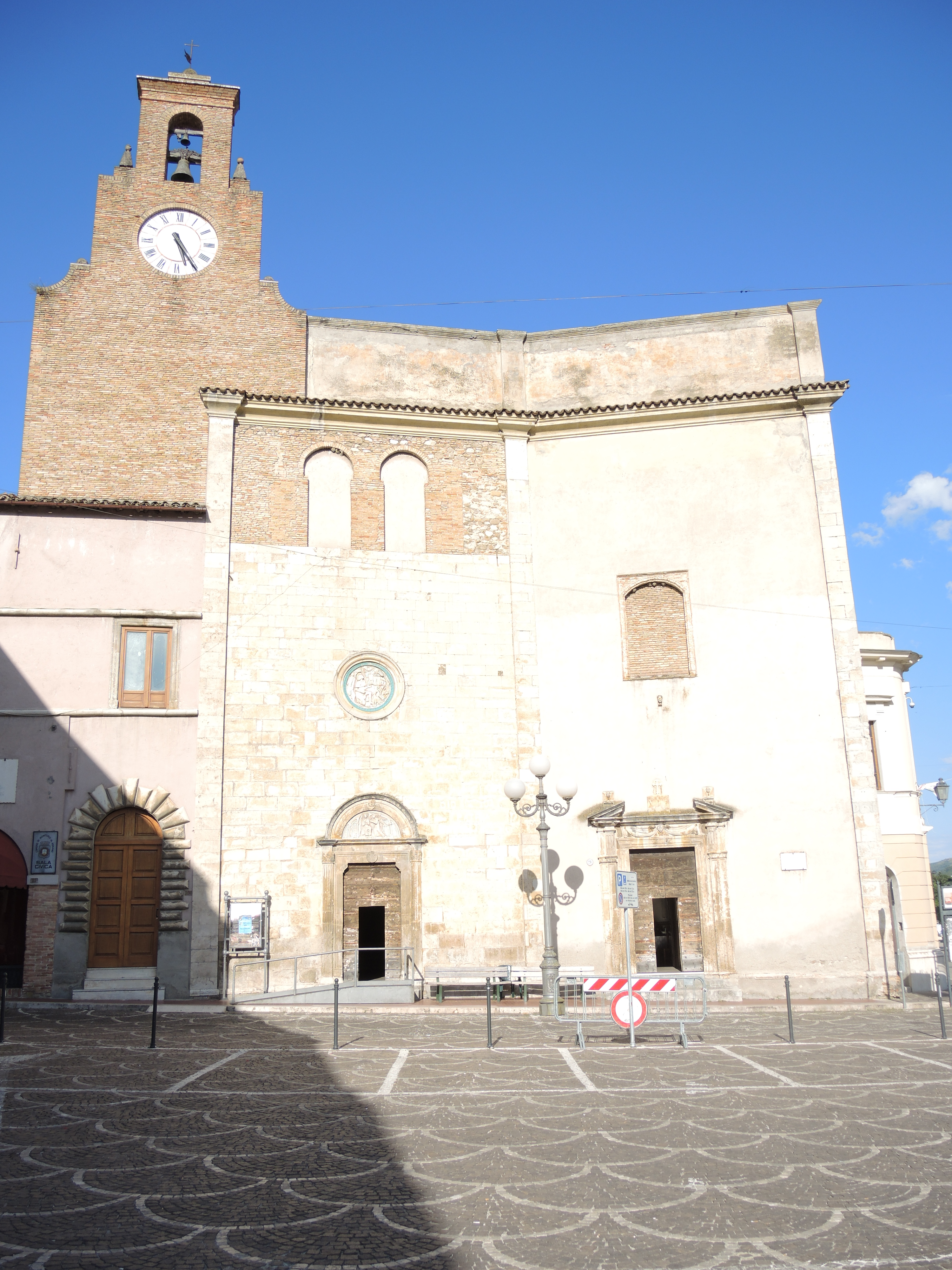 Montorio al Vomano: Chiesa di San Rocco